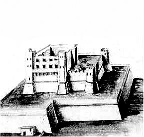 Castello di Matagrifone, Rocca Guelfonia, Torre bastione guelfonia a Messina